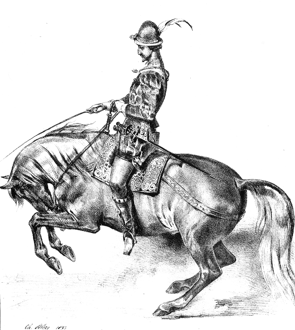 Représentation de Grisone dans L'Histoire pittoresque de l'équitation, Aubry (ed.1834).